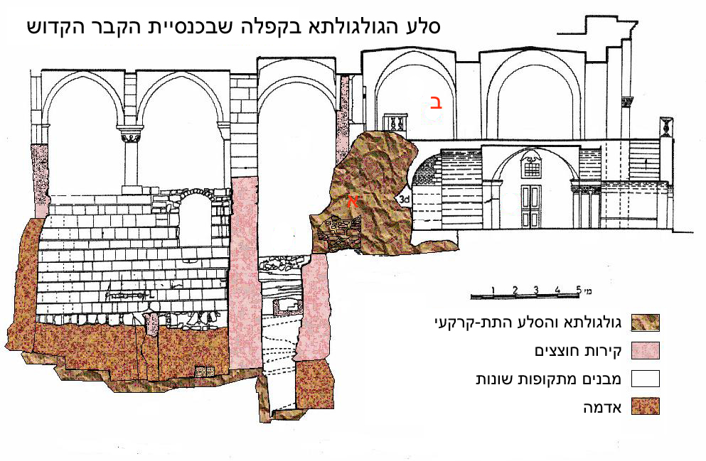 Le Golgotha et la Chapelle